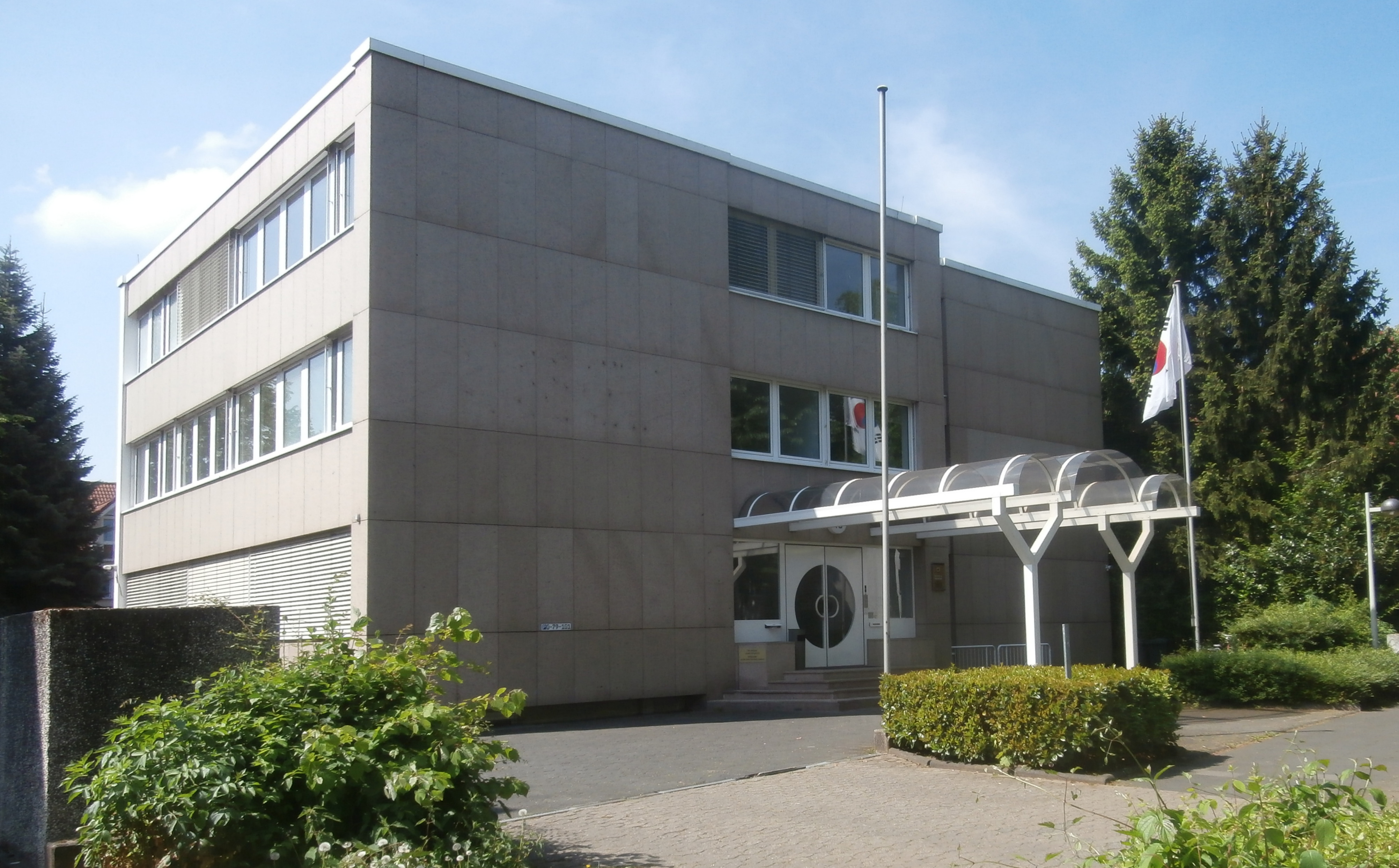 Außenstelle der Botschaft von Südkorea, Mittelstraße 43, Bad Godesberg